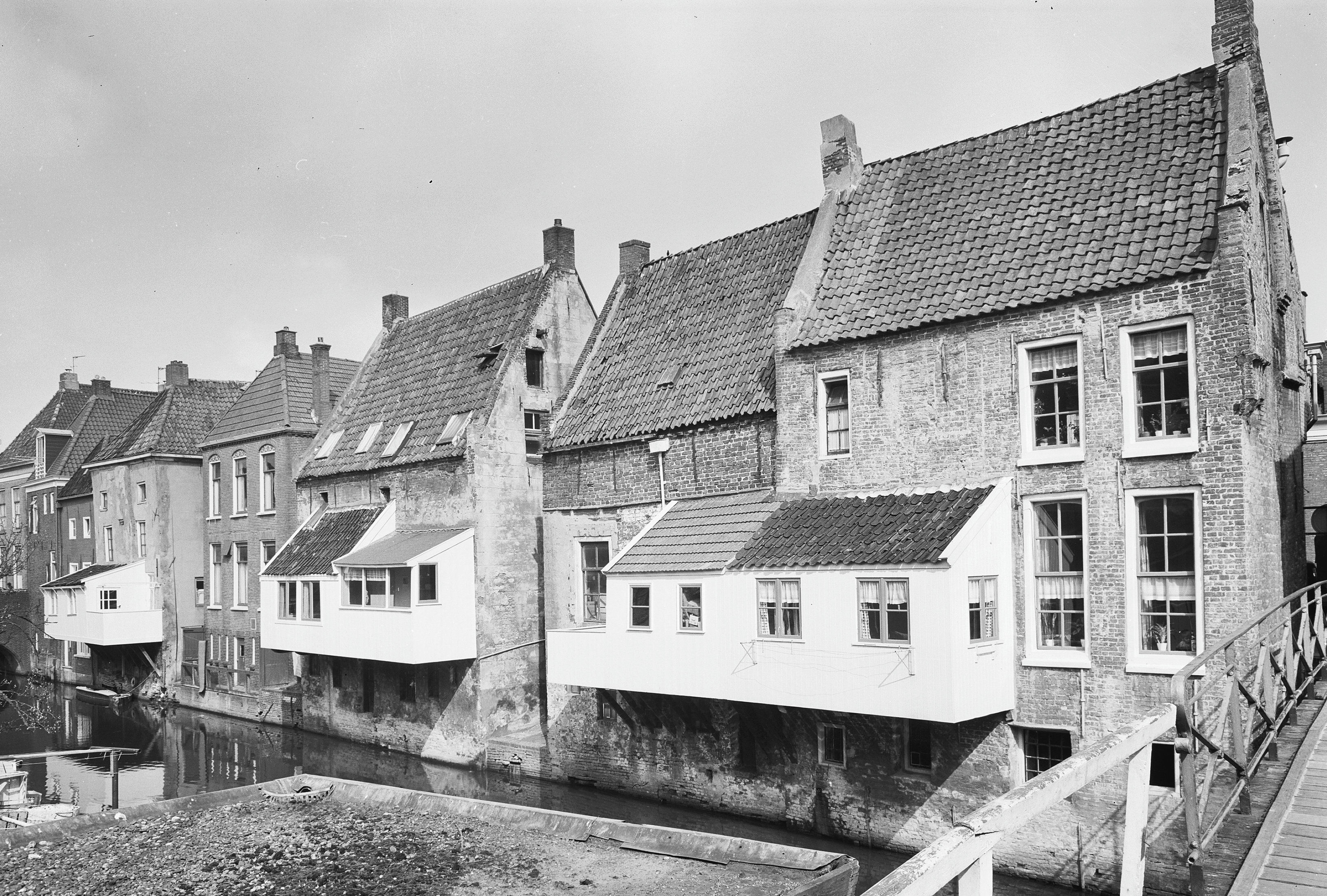 achtergevels vanuit Oude Kerkstraat